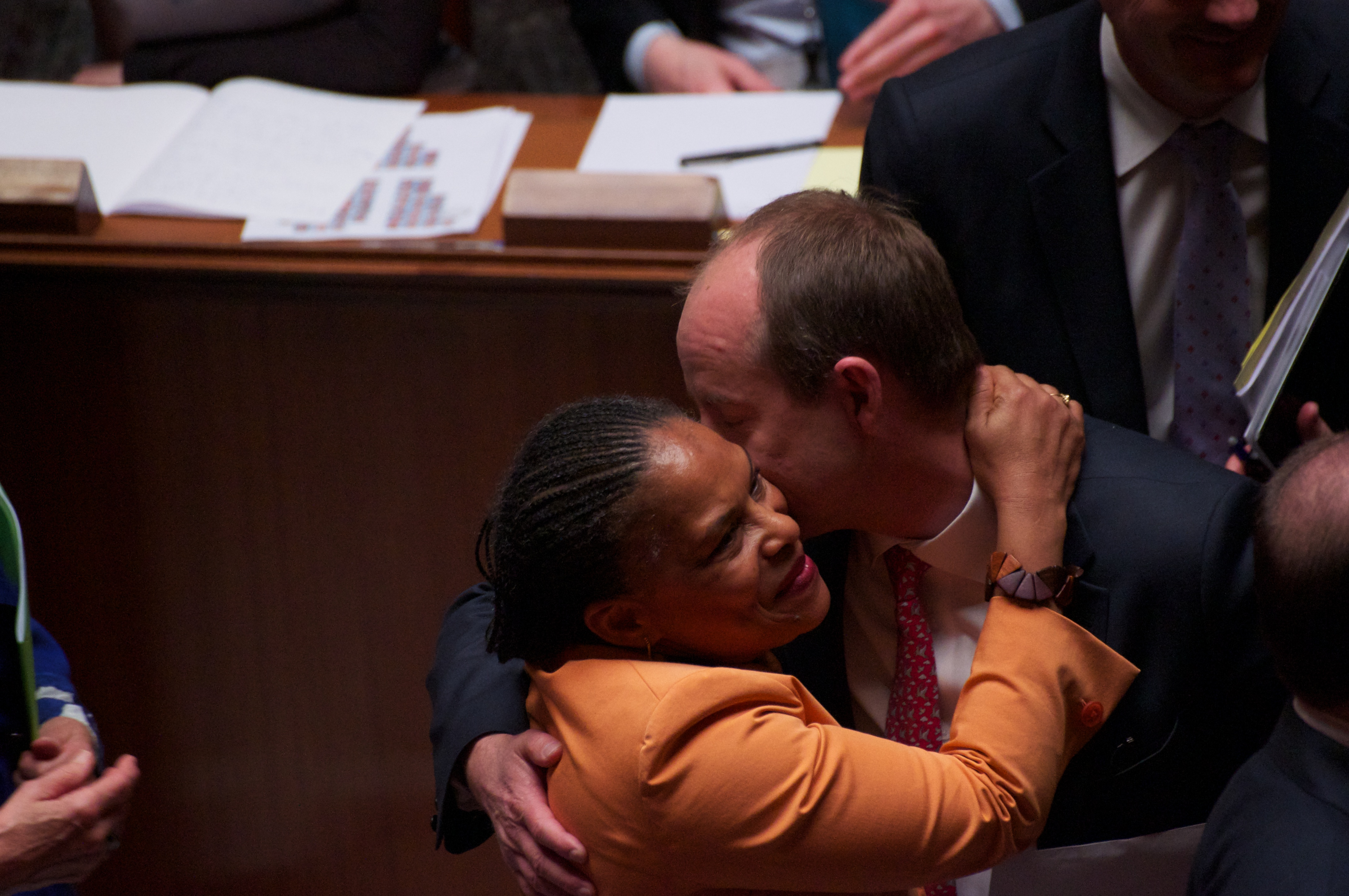 Christiane Taubira et Jean-Jacques Urvoas après le vote solennel de la loi ouvrant le mariage aux couples de personnes de même sexe - Assemblée nationale